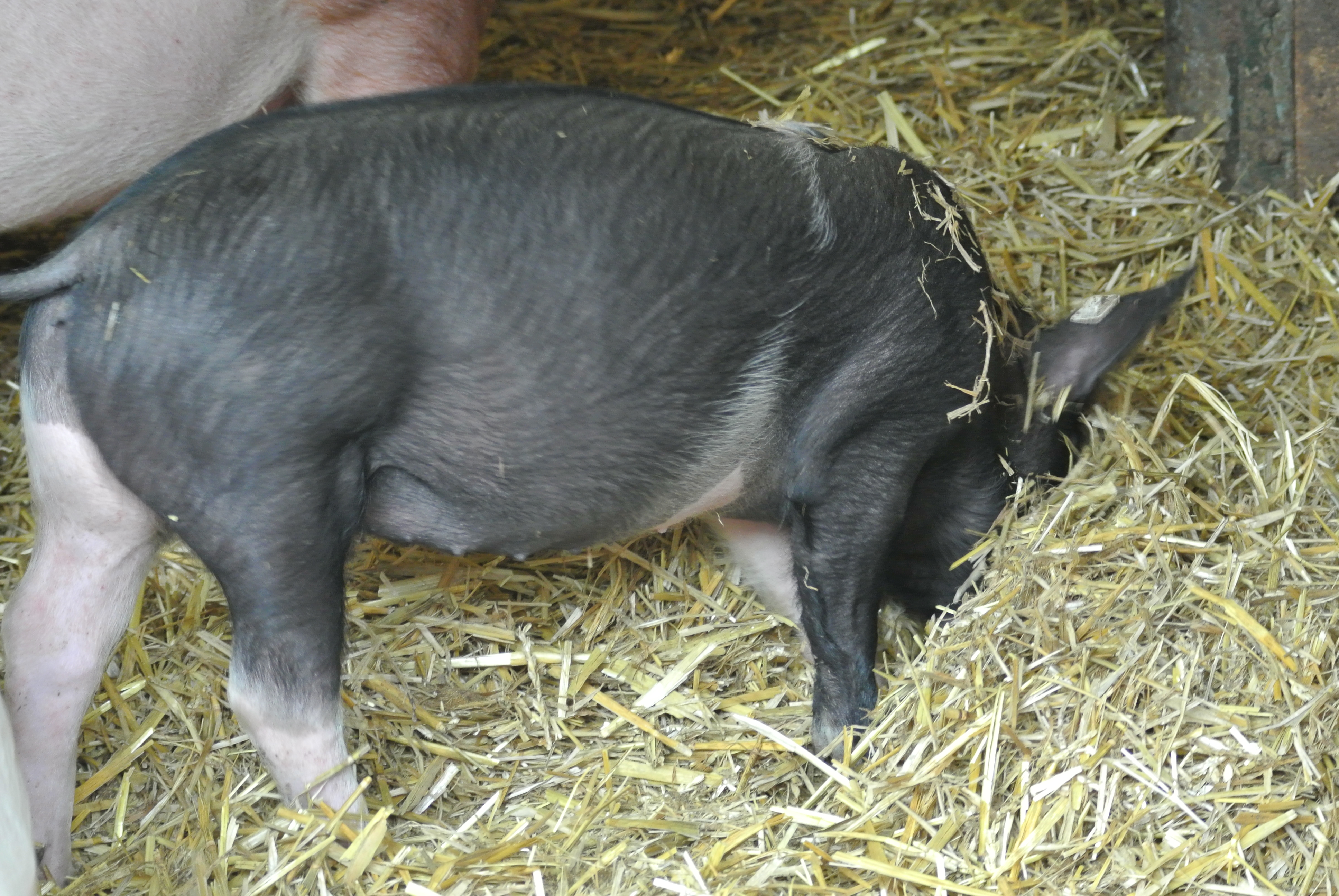 Ferkelleben mit viel Licht, Stroh und Auslauf